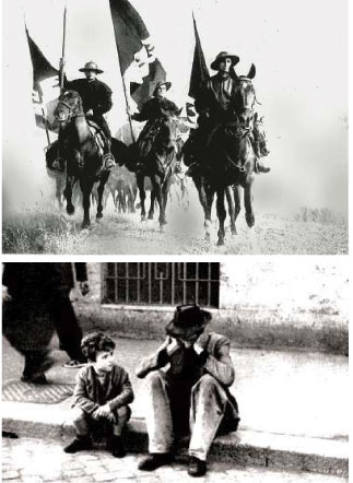 inquadrature da "Condottieri" (Trenker, 1938) e "Ladri di biciclette" (De Sica, 1948)